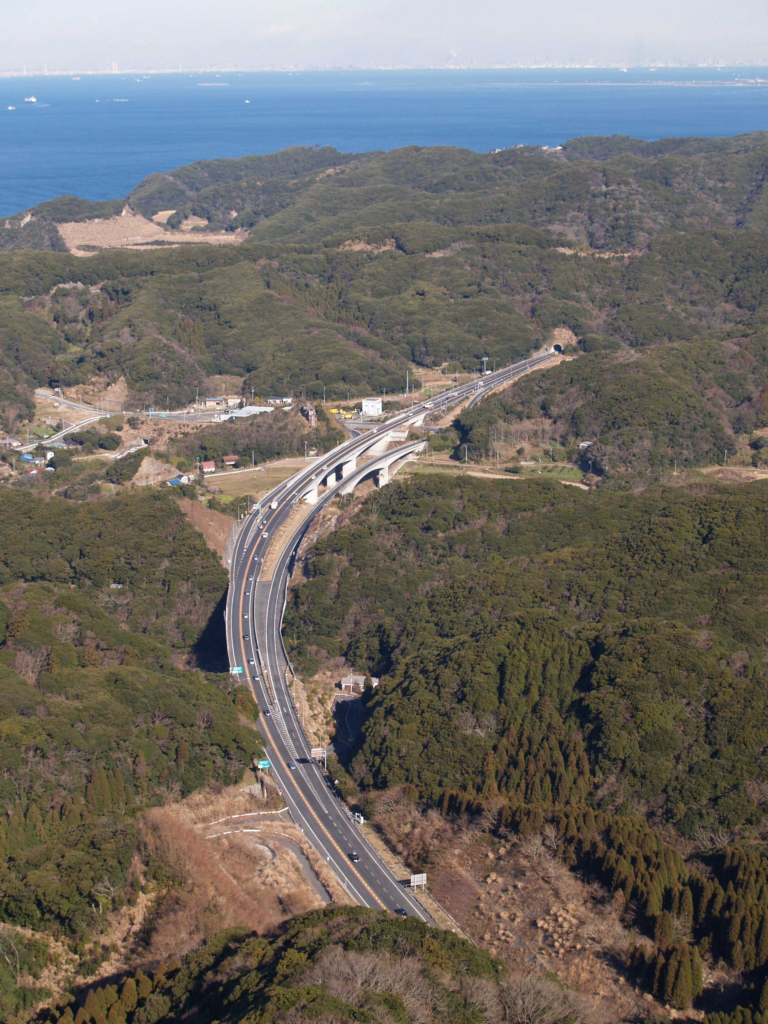 富津館山道路富津金谷インターチェンジ付近（鋸山山頂から撮影）